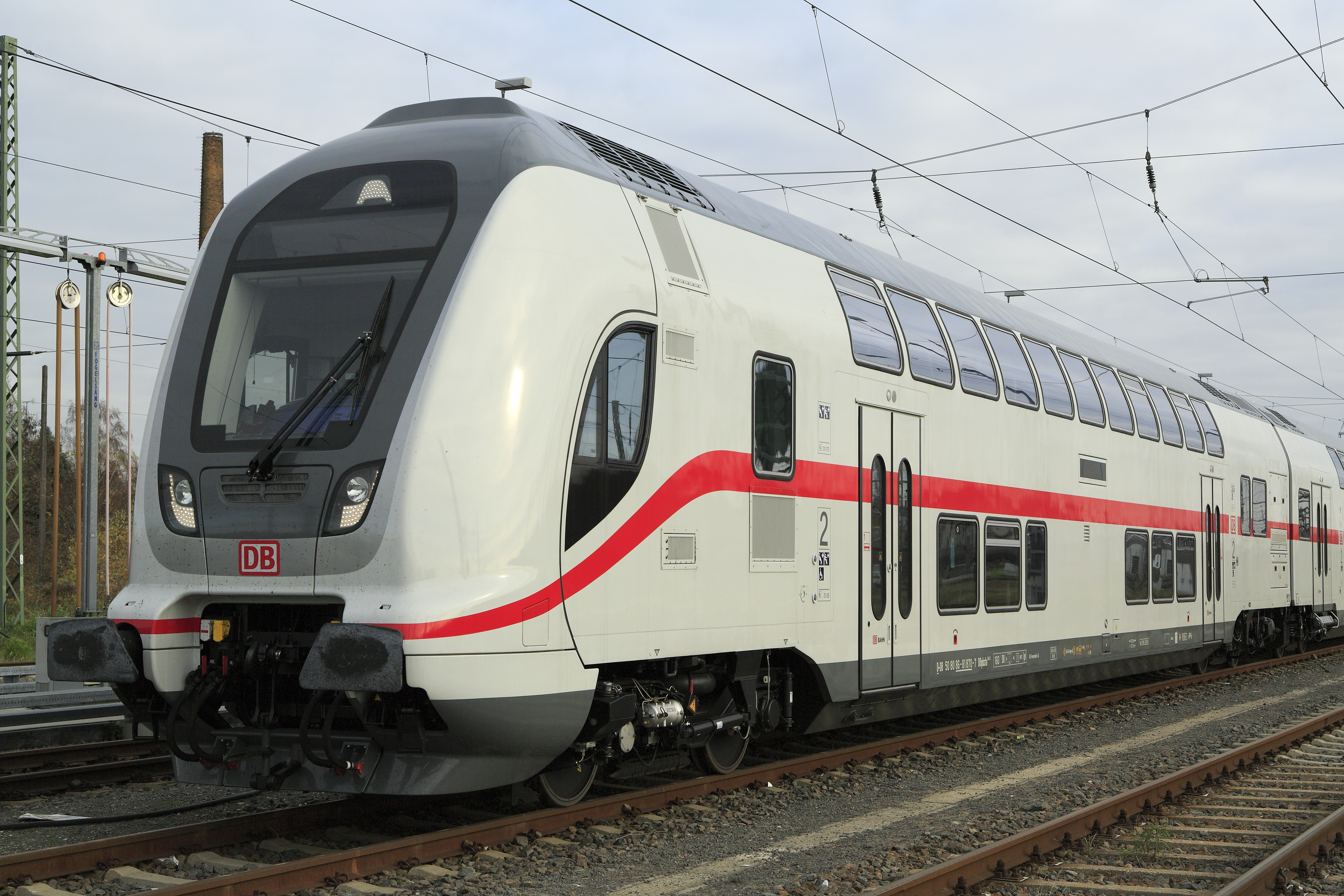 Für Personalschulungen aufgerüstet abgestellt. Nicht ganz verständlich ist die Ausrüstung von Lok und Steuerwagen mit Halogenscheinwerfern. Stand der Technik dürften die bereits bei vielen Fahrzeugen eingebauten LED-Einsätze sein.